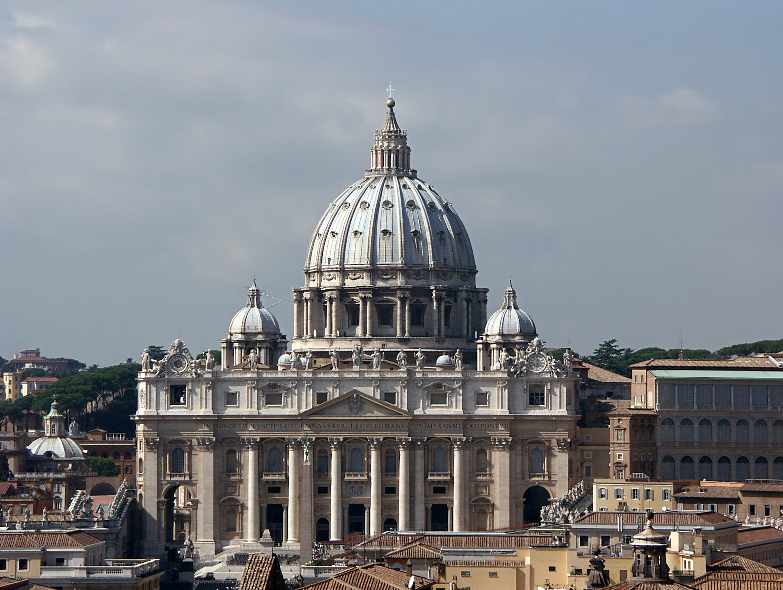 Petersdom in Rom, gesehen vom Dach der Engelsburg, September 2004